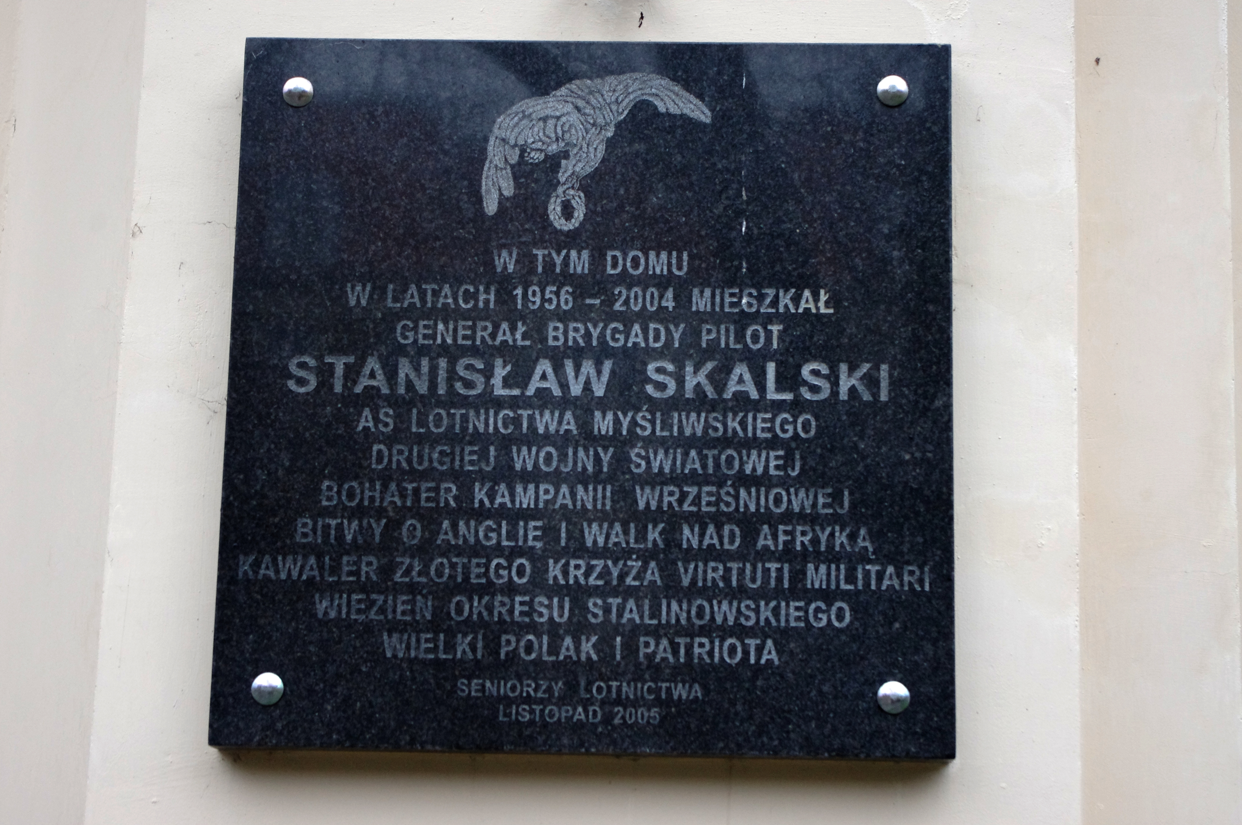 Tablica upamiętniająca Stanisława Skalskiego w Al. Wyzwolenia 10 w Warszawie